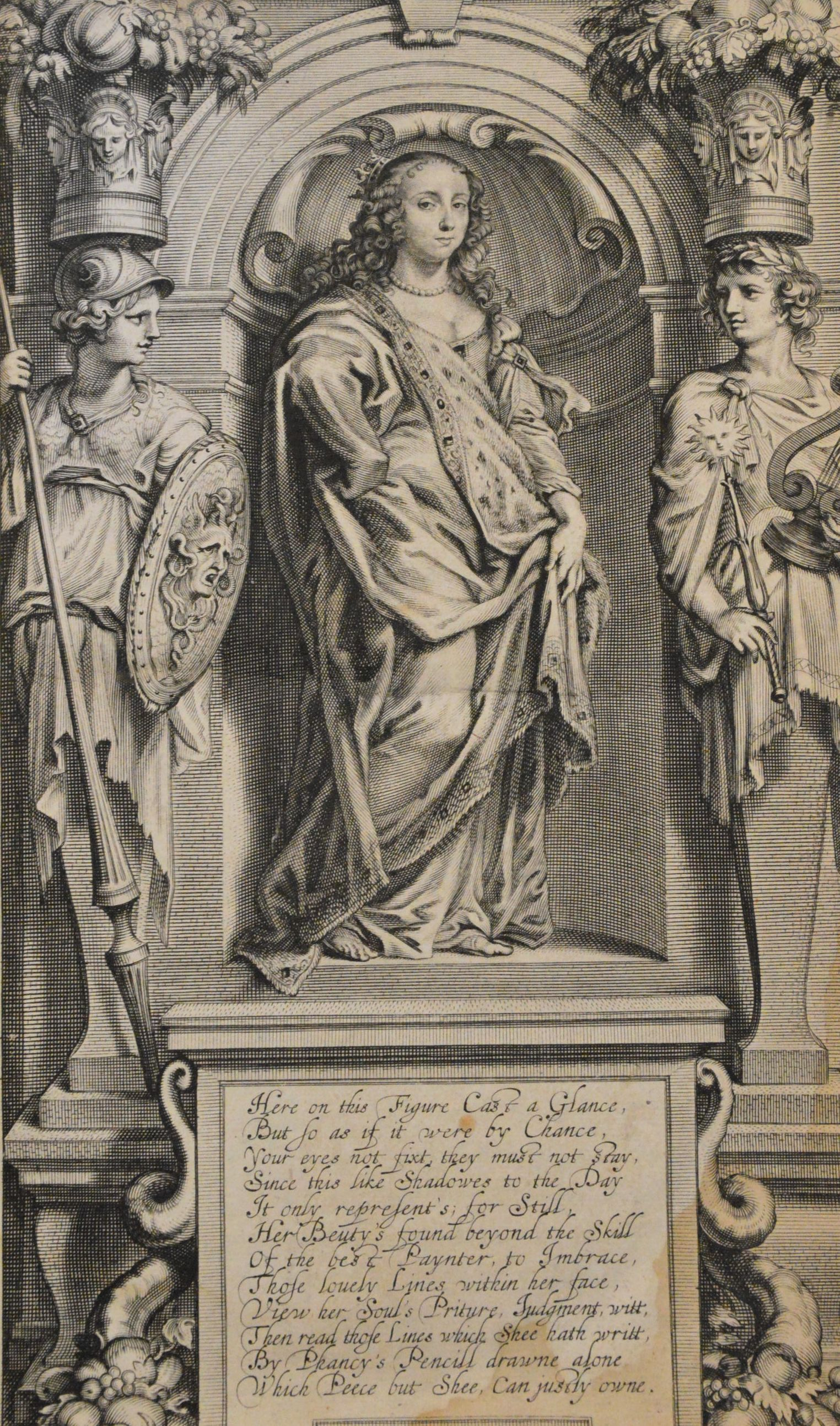 Portrait of Margaret Cavendish, lady Newcastle, from the frontispiece to her 'Poems and Fancies', 1653